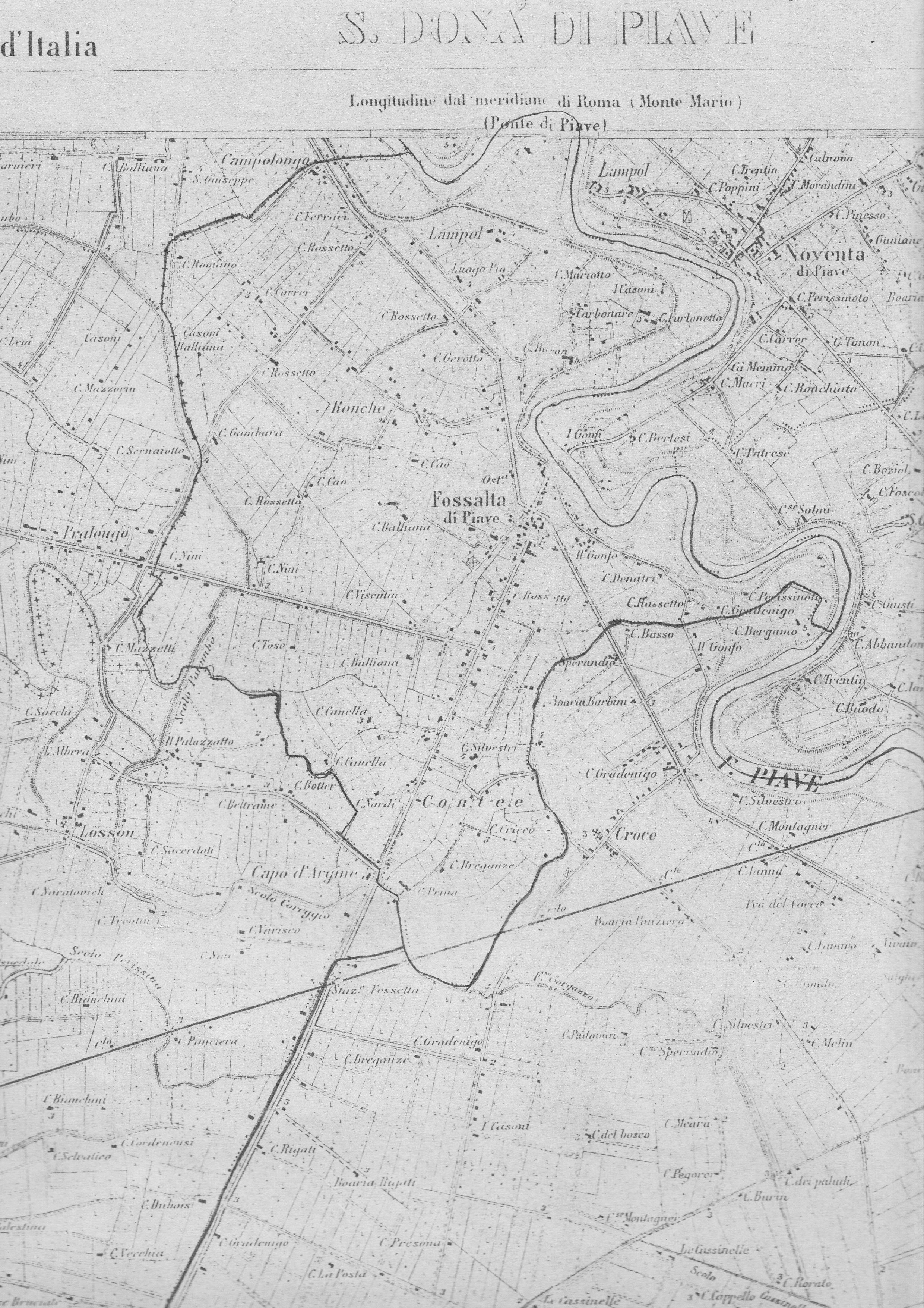 Parte della carta topografica del 1892 dell'IGM con Fossalta di Piave (sono stati indicati gli attuali confini del territorio comunale)